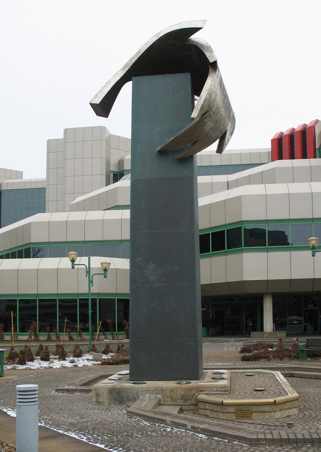 Jean-Pierre Morin, 1991. Monument pour une feuille, siège social de la Société de l'assurances automobile du Québec. Vieux-Port de Québec. Ville de Québec (Québec) Canada. Acier inoxydable et bronze, 860 x 280 x 220 cm